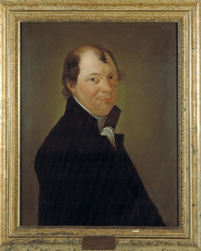 Prof. Jonathan Friedrich Bahnmaier (Tübinger Professorengalerie)